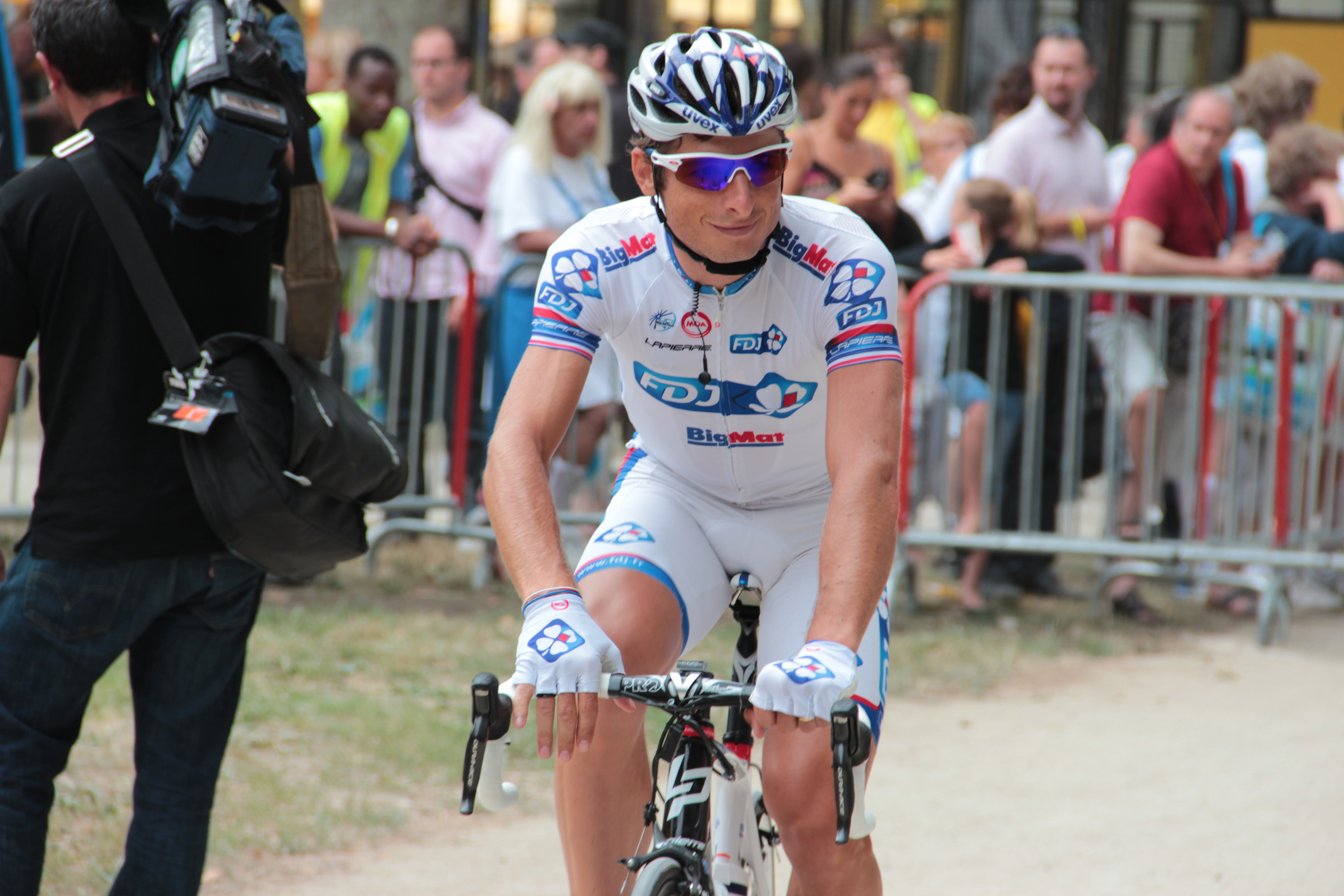 Pierrick Fédrigo avant le départ de la 18e étape du Tour de France 2012.